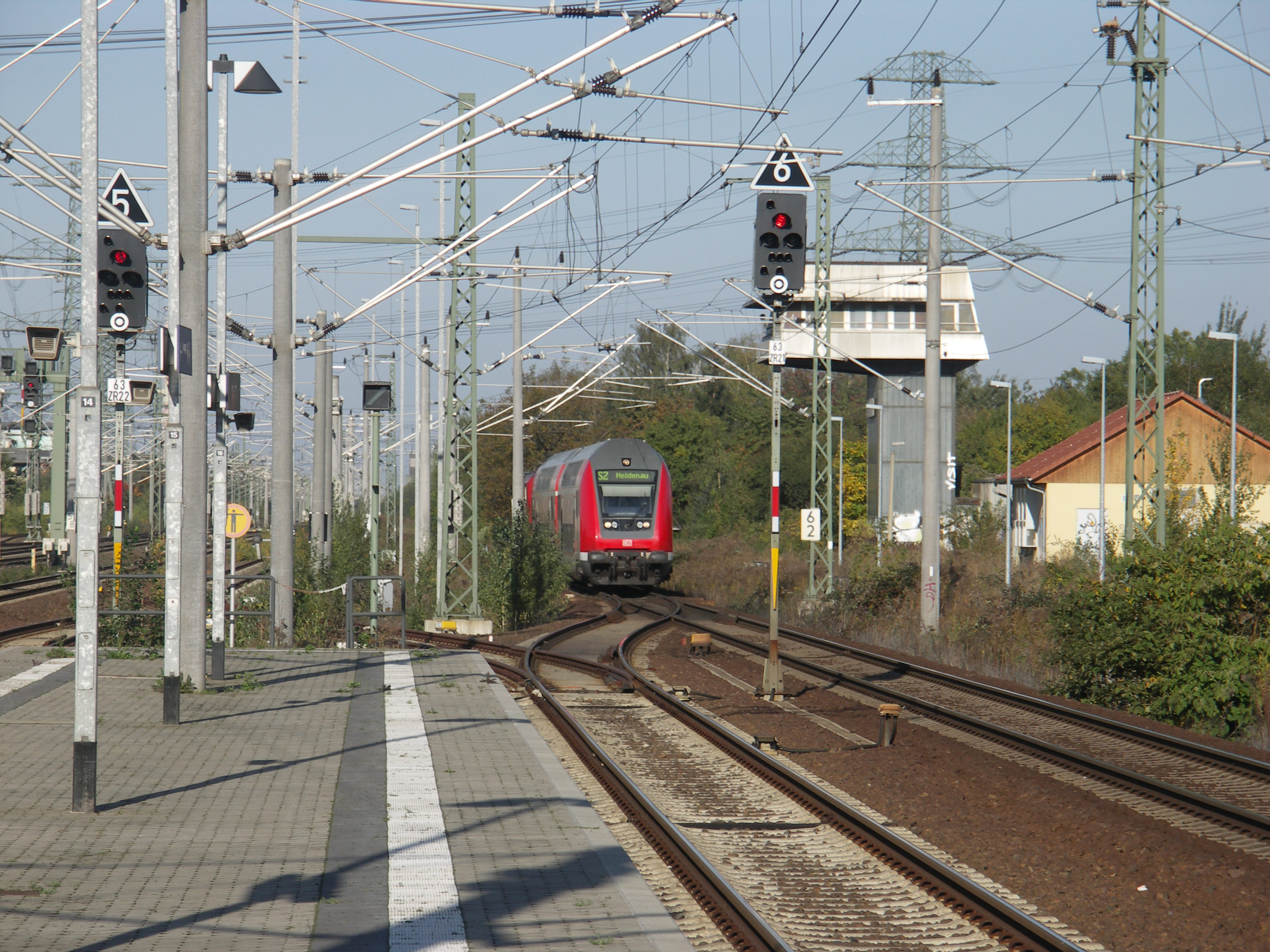 Einfahrender Zug [2006/10]